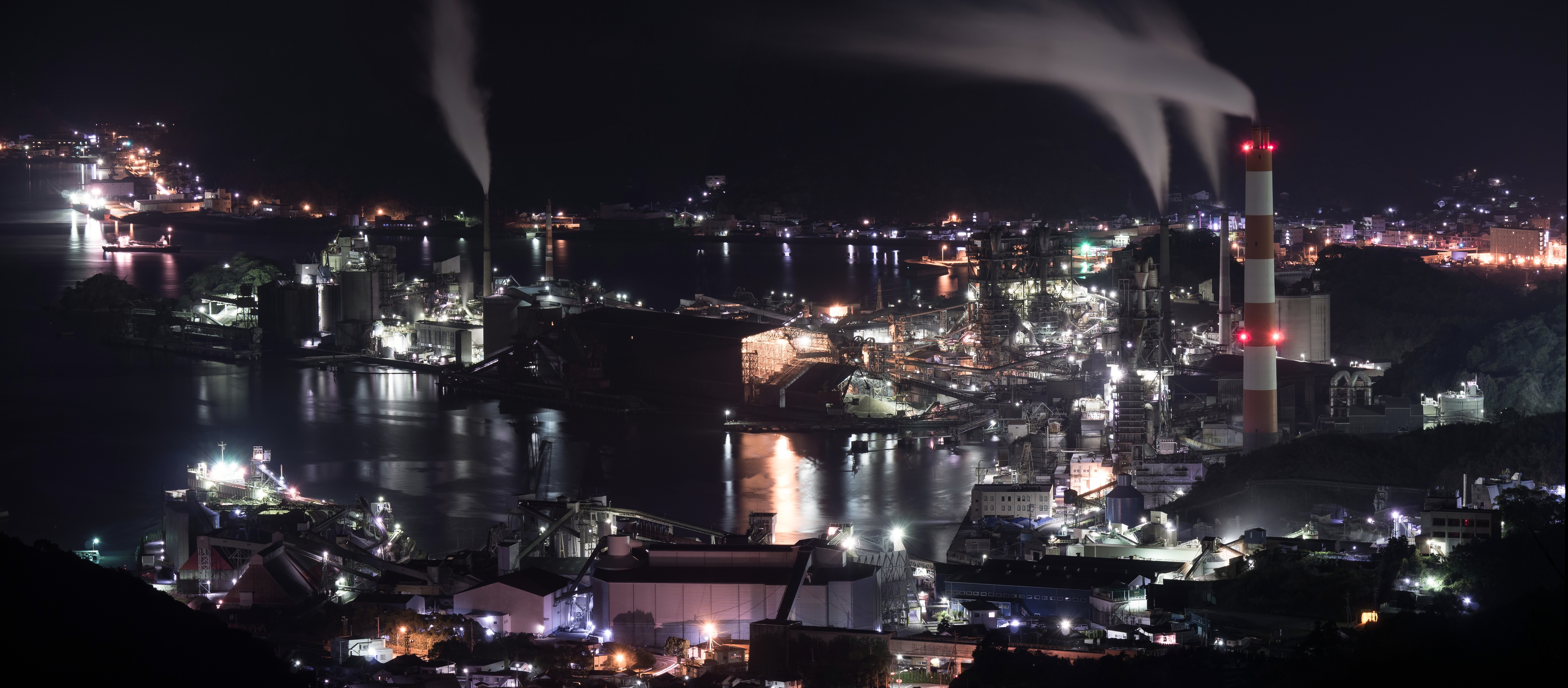 Tokuura, Tsukumi, Oita Prefecture 879-2474, Japan